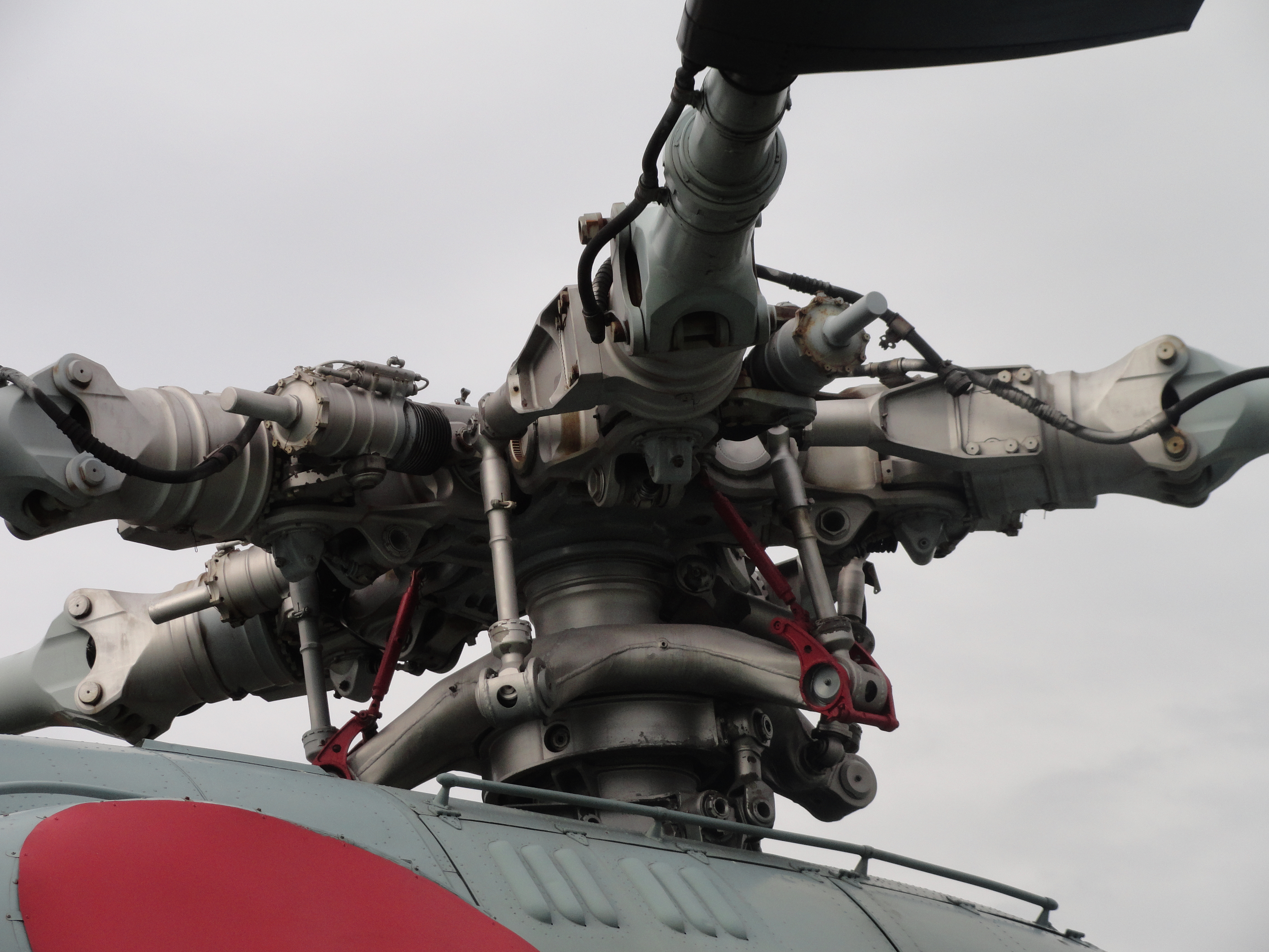 Автомат перекоса вертолёта Ми-6. Фото сделано в музее авиации в Киеве